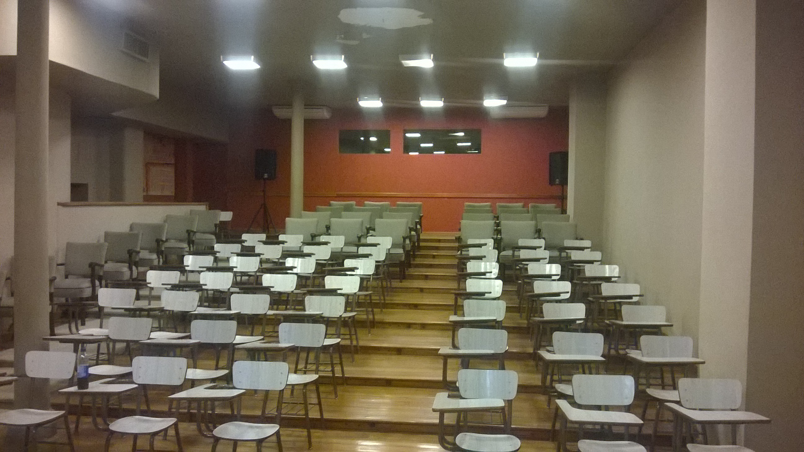 Foto del autor, sobre una vista general del Salón San Martín. Escalonado, con amplias sillas, sistema de sonido, y a las espaldas, una pantalla de proyección. Tiene escenario, estrado y mesa.